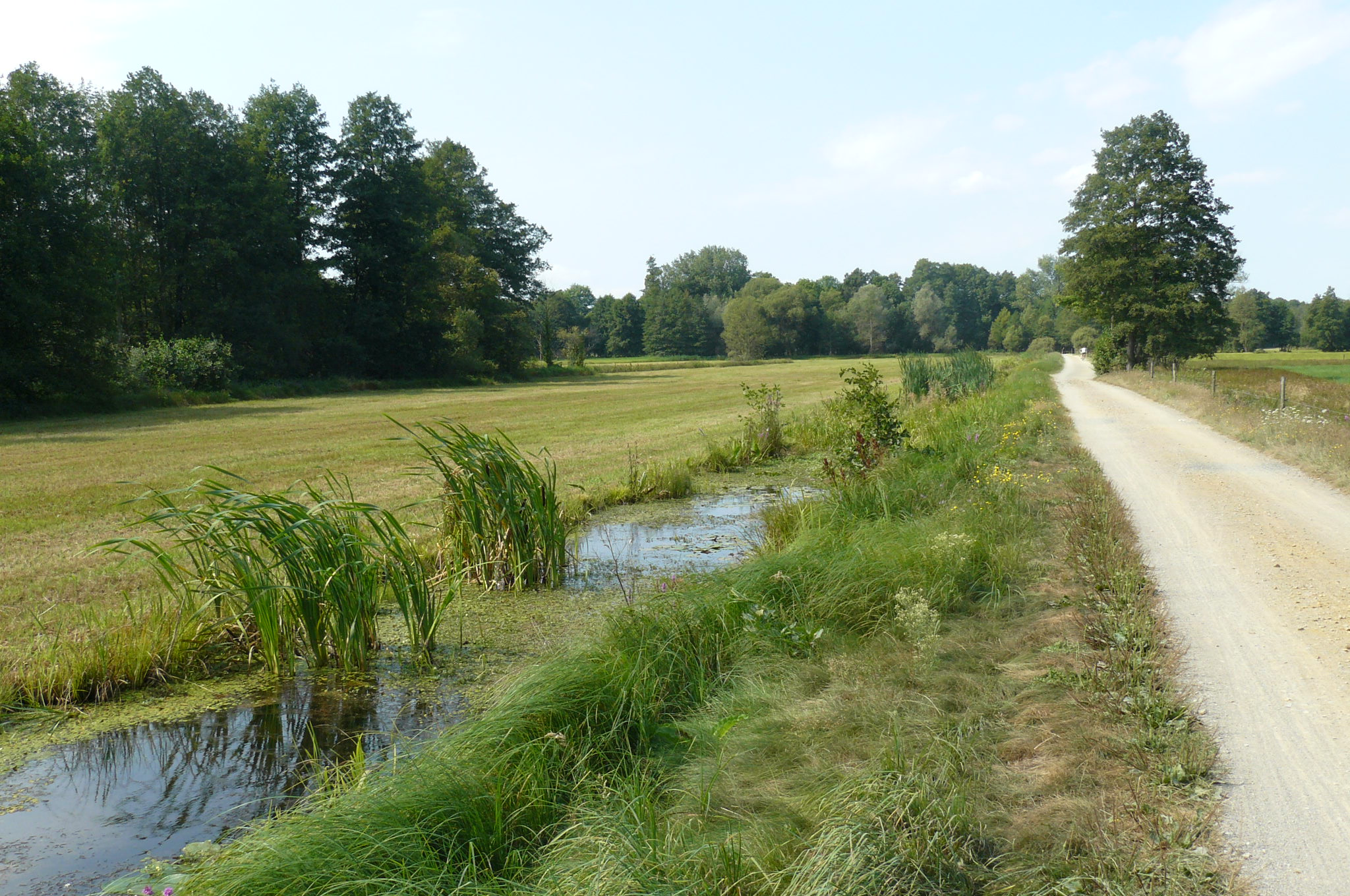 Gurkenradweg. Szlak ogórkowy, Spreewald.